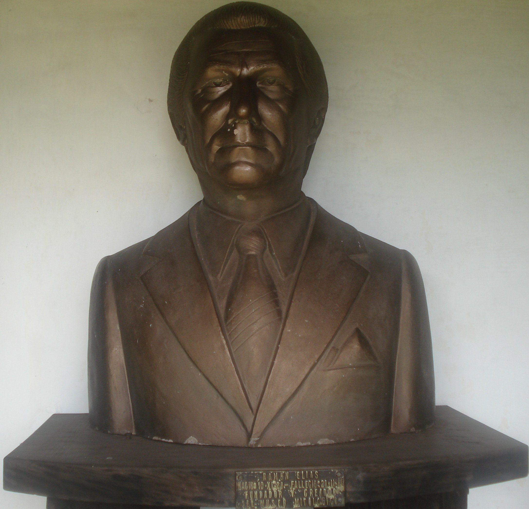 Ramón Elías